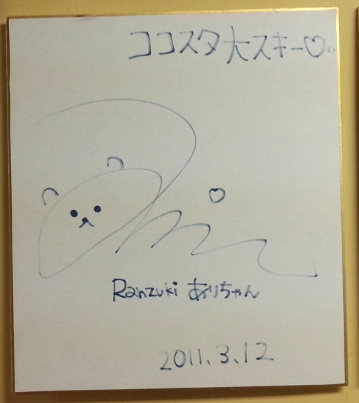 日焼けサロンココナッツスタジオに飾られている鎌田安里紗のサイン色紙。